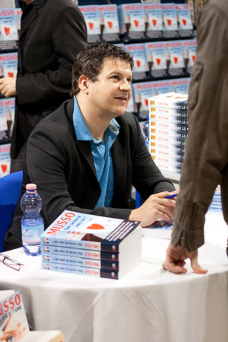 photo de guillaume Musso en seance dedicace